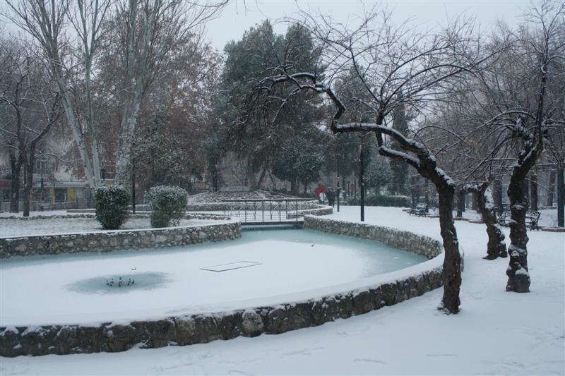 Parque Gonzalez Bueno nevado en Arganda del Rey